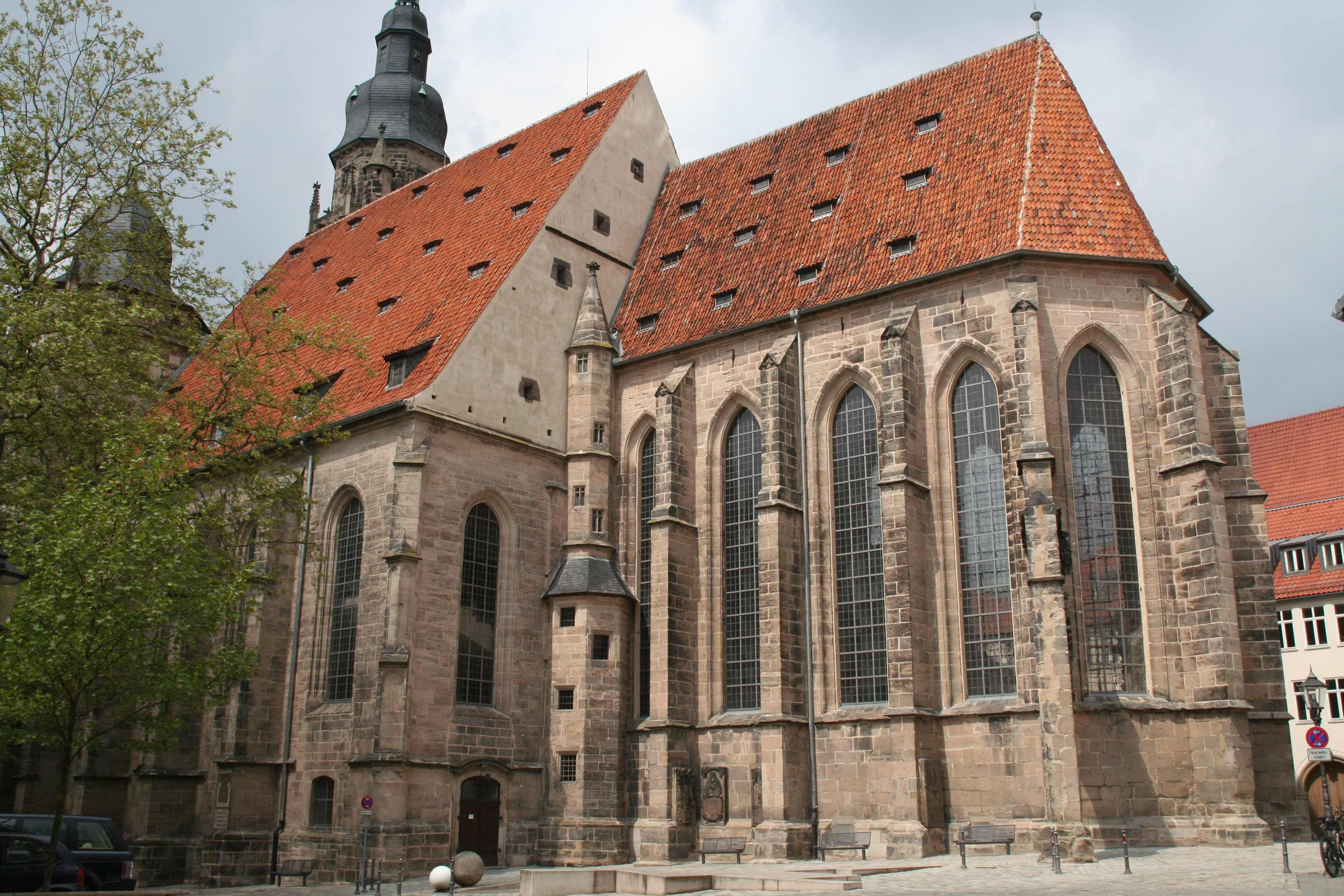 Morizkirche, Kirchhof 1 Coburg Chor der Morizkirche in Coburg